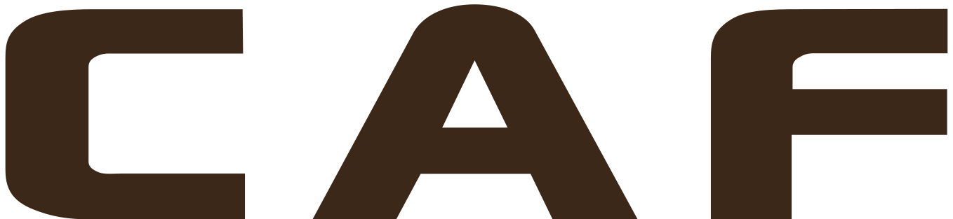 Logo de la confederación africana de fútbol.